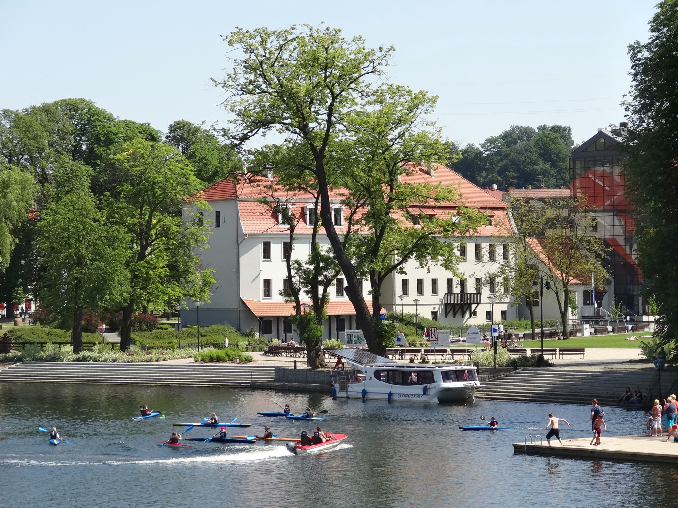 Zakole Brdy z nabrzeżem Wyspy Młyńskiej w Bydgoszczy